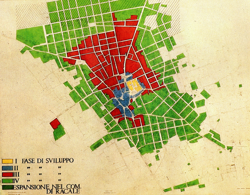 Descrizione= La cartina raffigura le fasi principali dello sviluppo dell'abitato di Alliste (Italia). Fonte= Own work Data= 1986 Autore= Antonio47